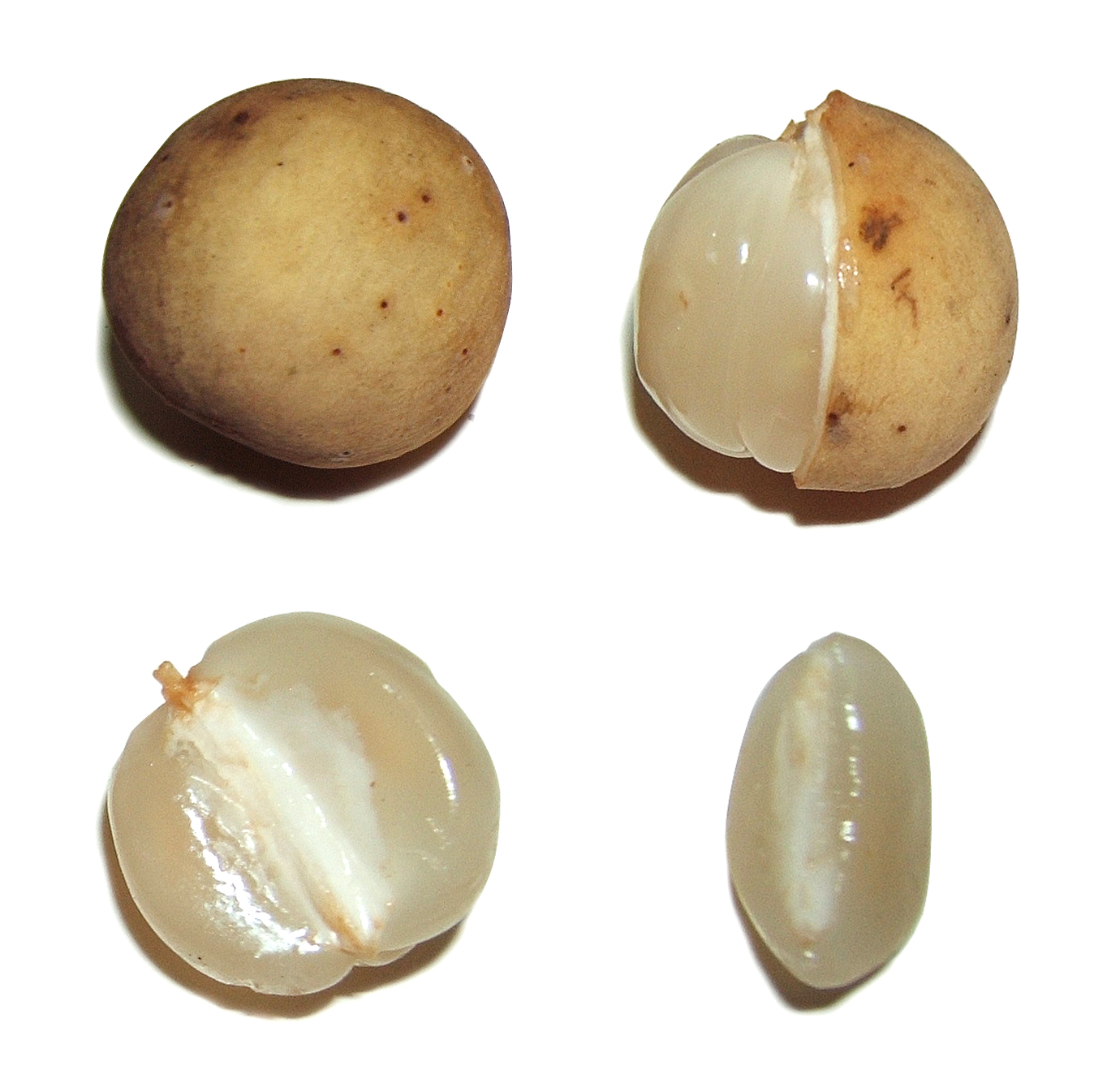 Lansium domesticum fruit (Longkong, Langsat, etc.)